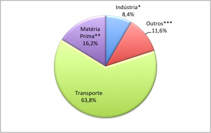 Gráfico do uso do petróleo por setor